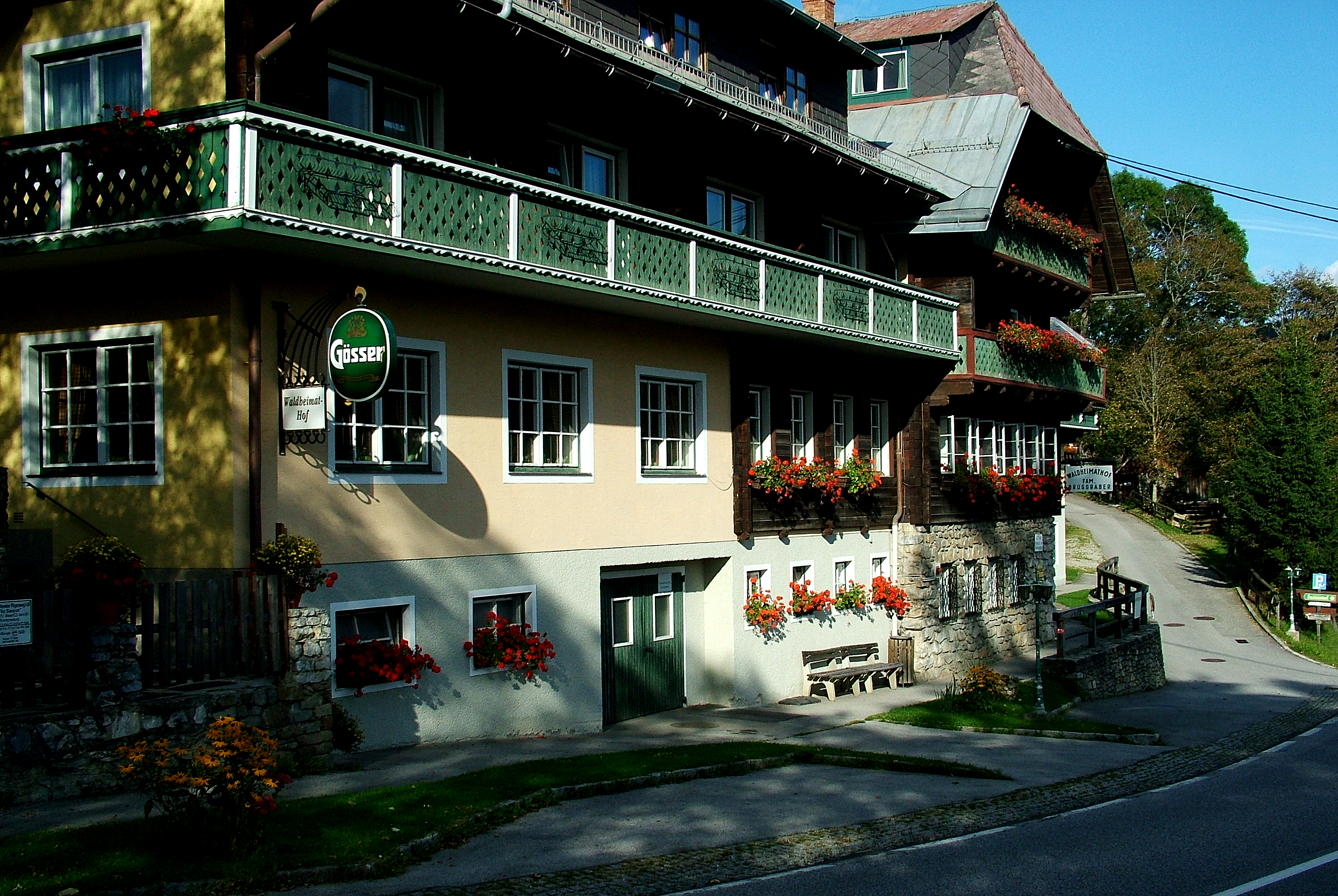 Alpl-hágó: Fogadó (Krieglach, Ausztria). Waldheimathof Bruggraber, Alpl. Ehemaliger führender Gastwirtschaftsbetrieb der Region (Clubdörfl Alpl mit Sommer- und Winterbetrieb, eigene Schilifte), 2014 in Konkurs und 2017 noch geschlossen.